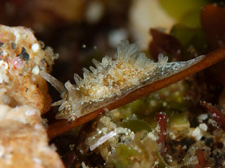 Okenia distincta a 19 m, en Osezaki, Japón